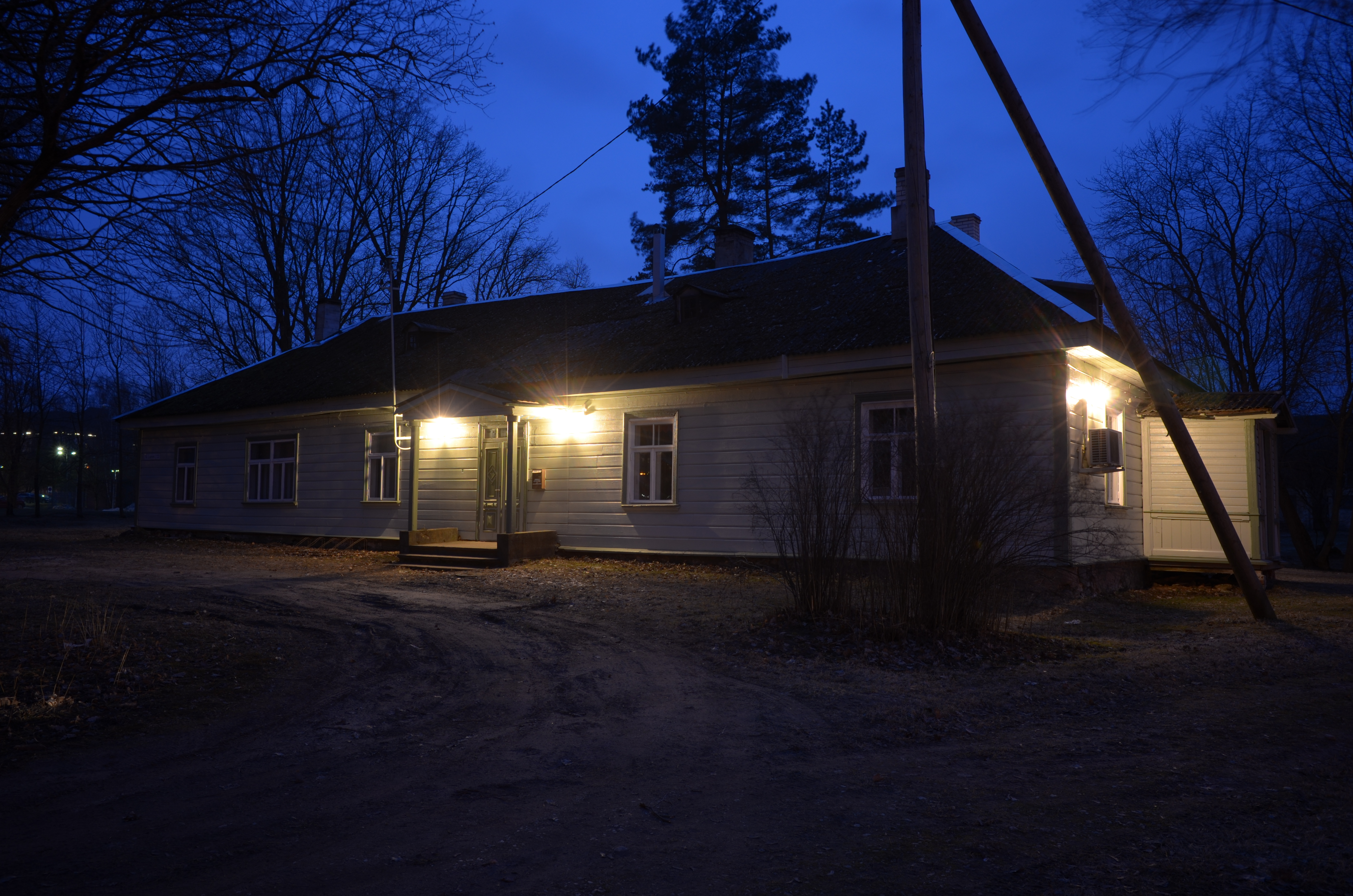 Maarjamõisa mõisa peahoone 2019. aastal